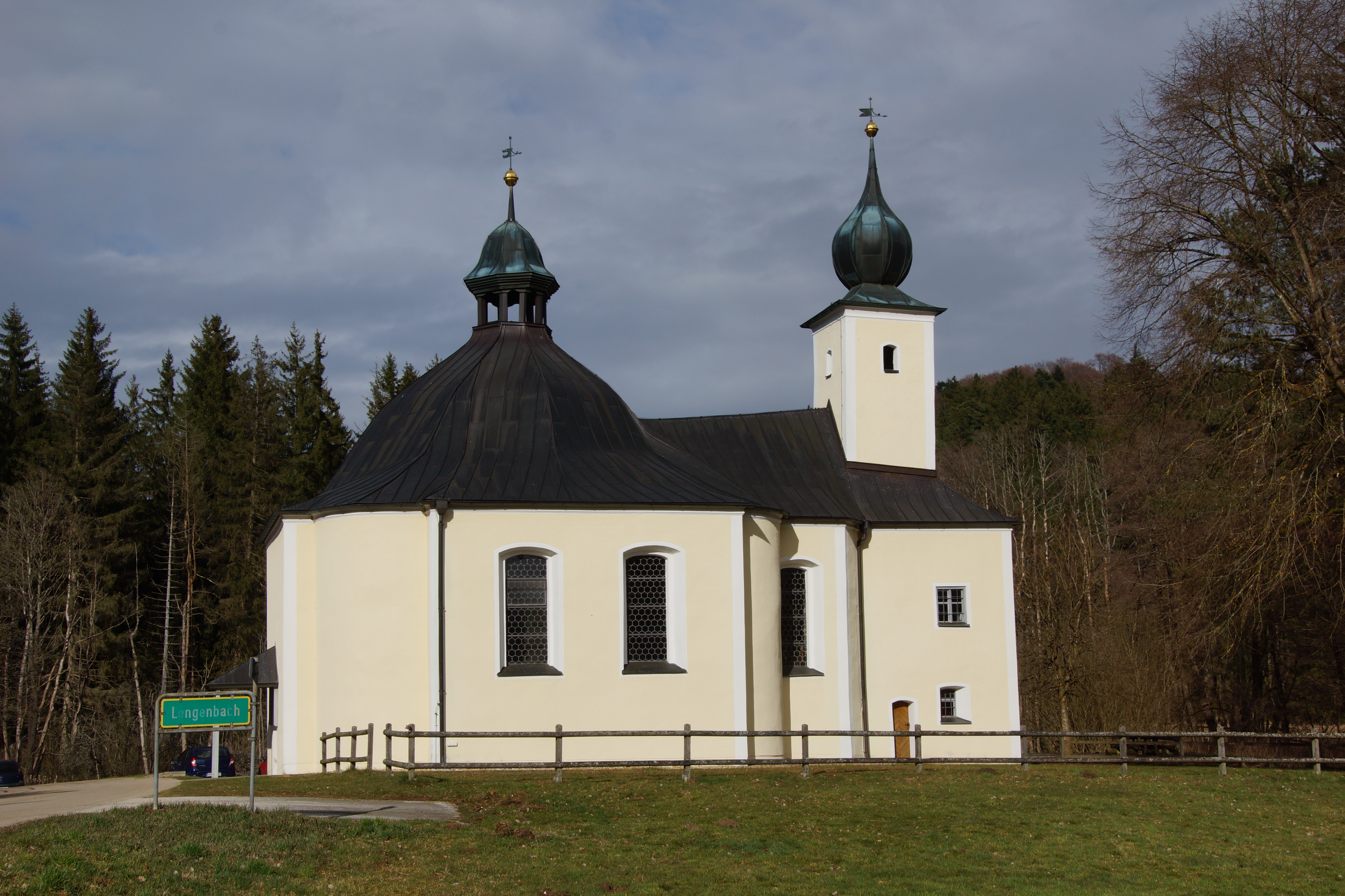 Die Wallfahrtskirche Maria-Hilf im Lengenbachtal